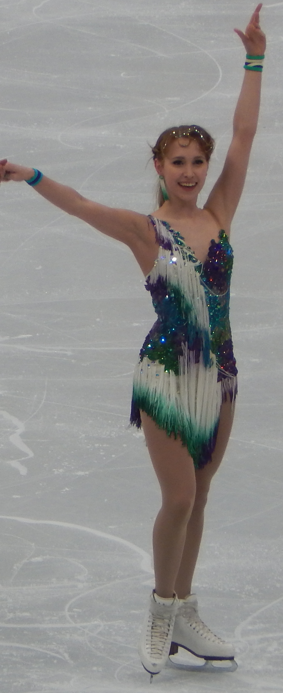 Чемпионат Европы по фигурному катанию 2018 в Москве. Третий день соревнований (19 января). Танцевальная пара из Франции Анжелика Абашкина и Луис Торон